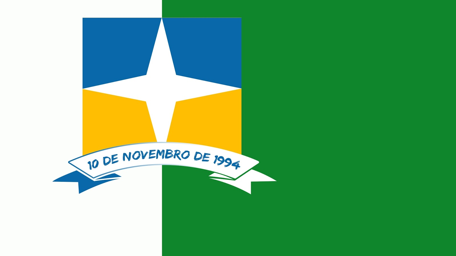 Bandeira oficial de Davinópolis Maranhão